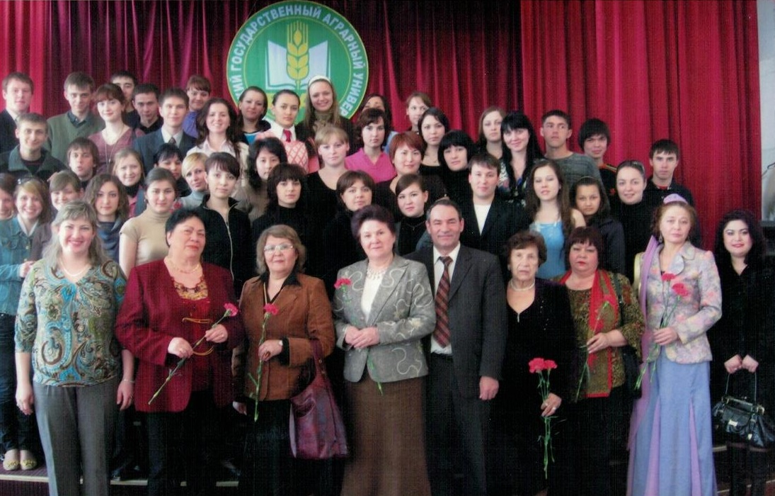 Члены Общества башкирских женщин - в Аграрном университете. Уфа